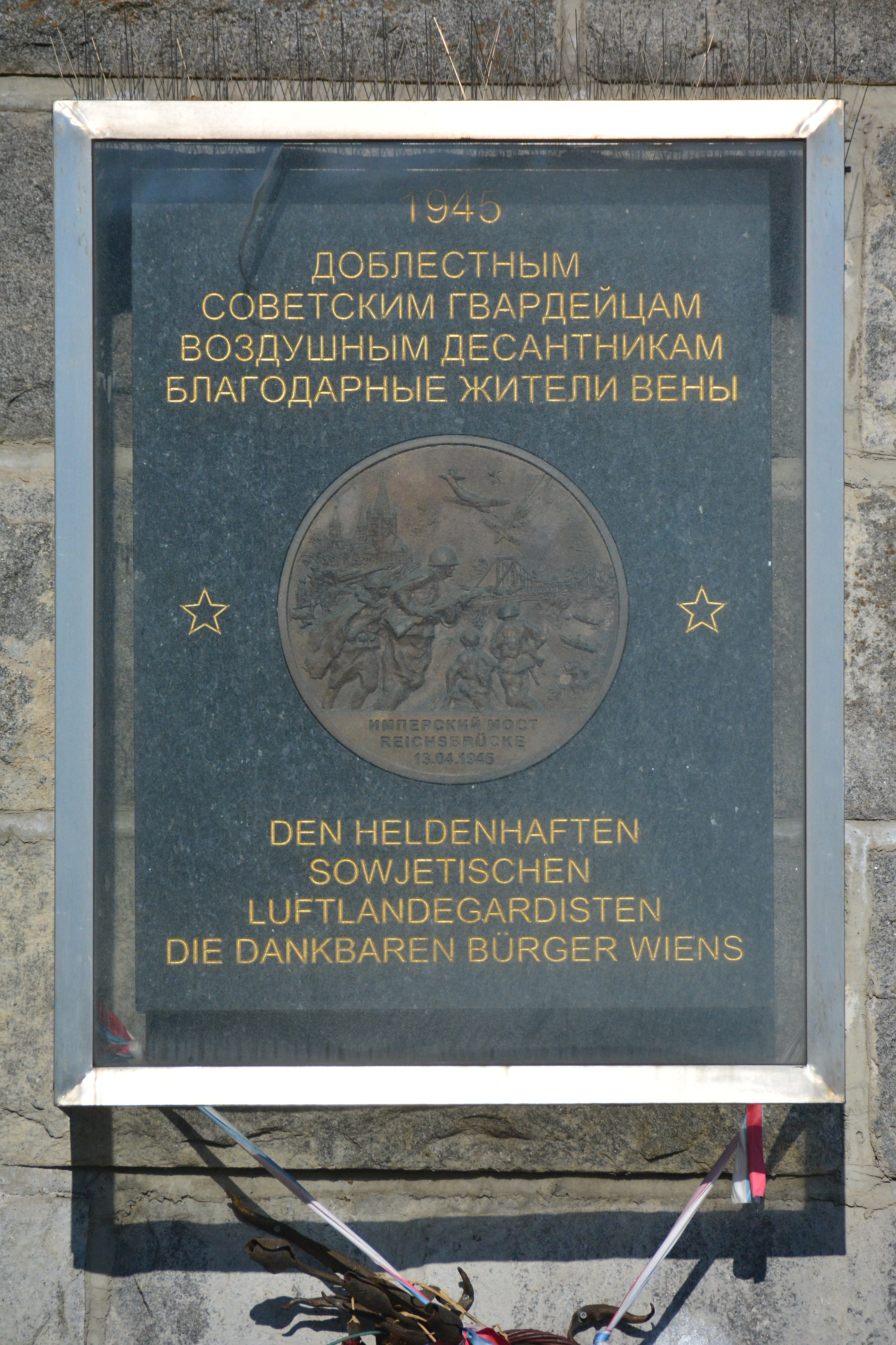 Gedenktafel für die Luftlandegardisten (Wien, Mexikoplatz, Reichsbrücke) Auf dem Relief sind die Reichsbrücke und die Franz-von-Assisi-Kirche zu erkennen